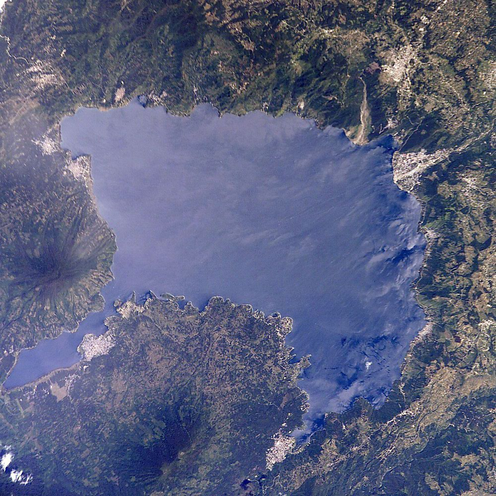 El Lago de Atitlán, Guatemala, fotografiado desde el Transbordador espacial